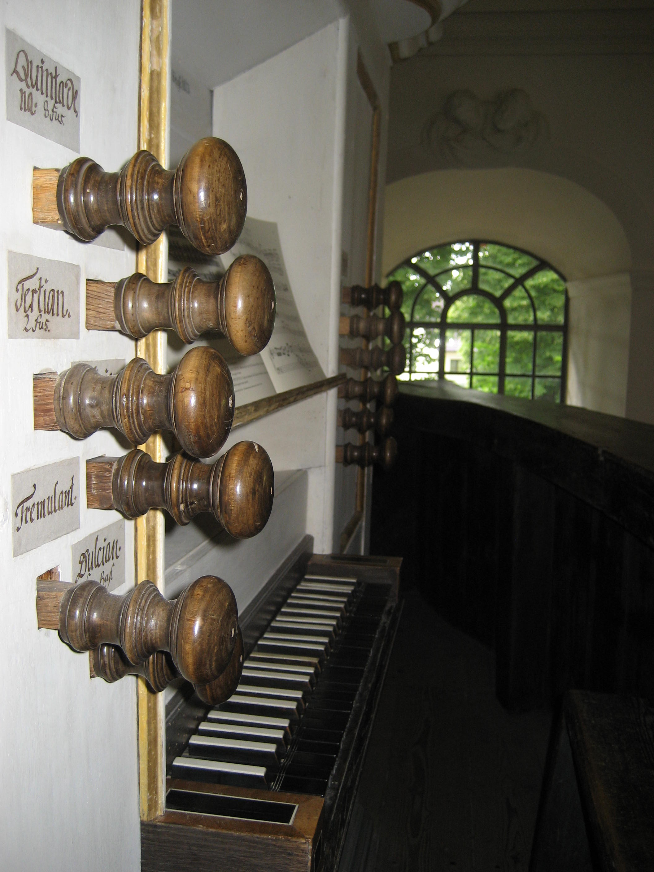 Ansicht des Spieltisches